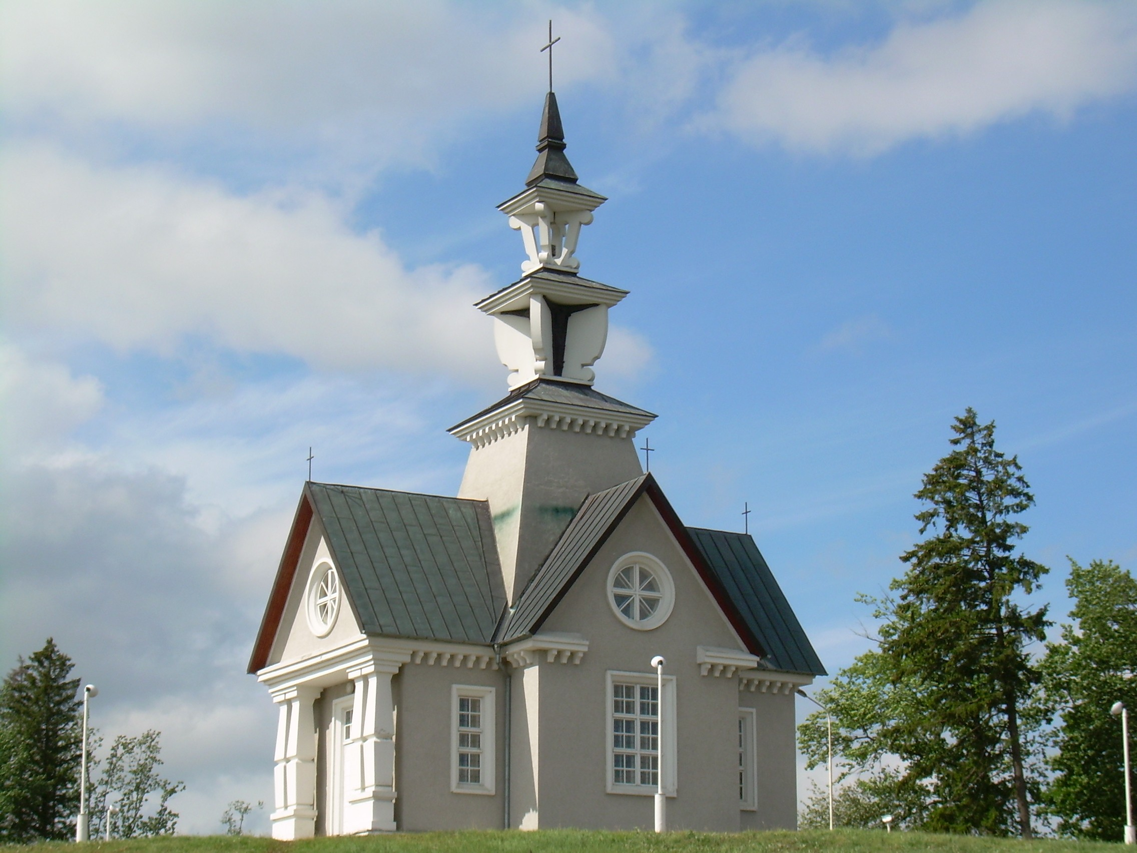 Rainių koplyčia